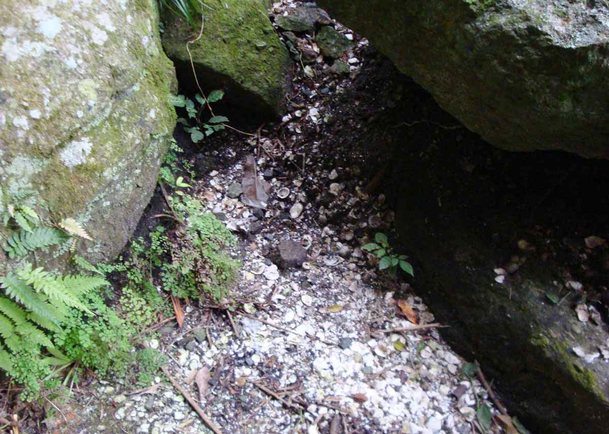 Sambaqui no Sítio arqueológico "Benedito Fortes" em Iguape (SP)